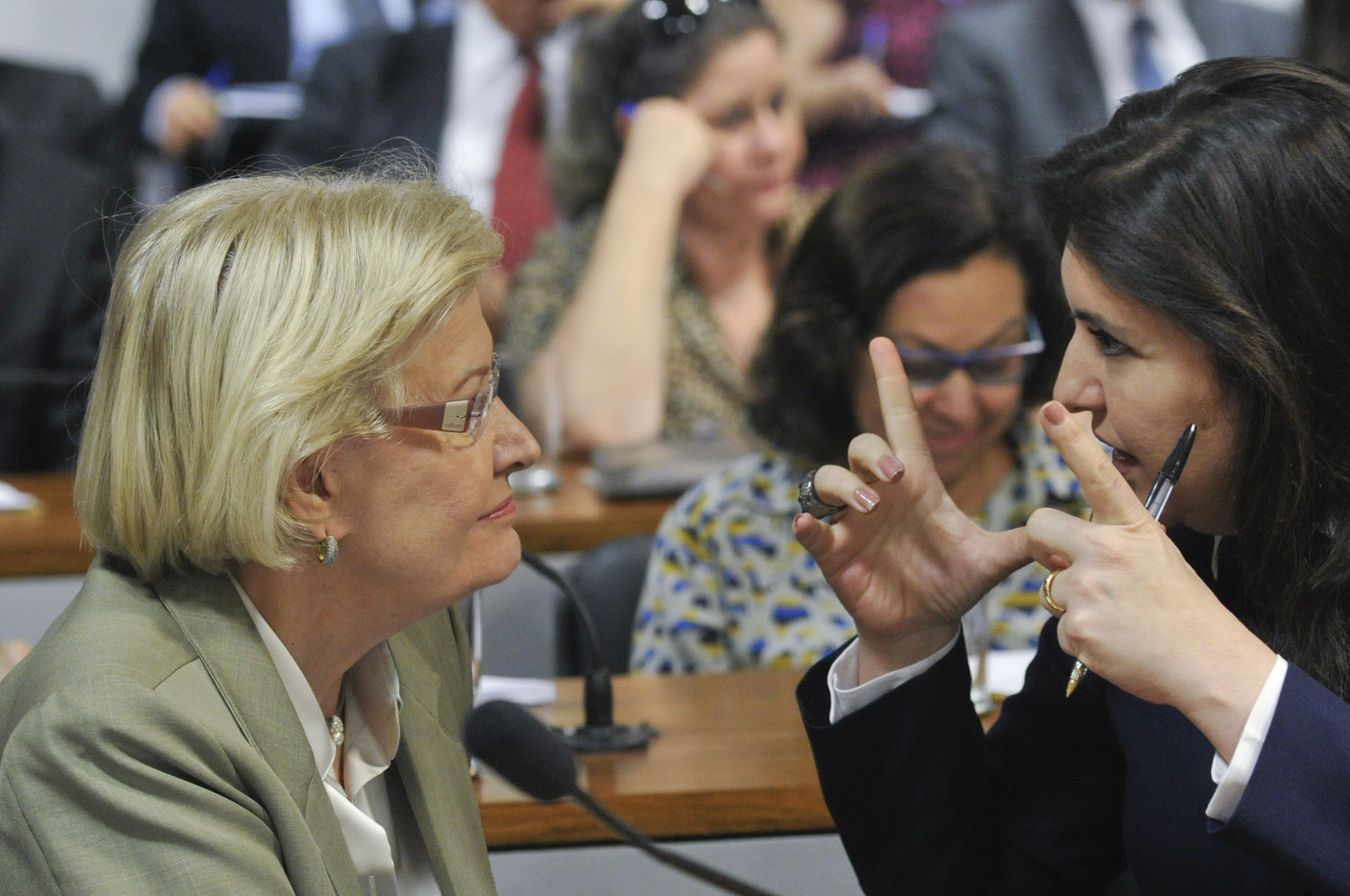 Comissão de Educação, Cultura e Esporte (CE) realiza reunião deliberativa com 20 itens. Na pauta, PLS 138/2012, que institui exame para revalidação de diplomas médicos de universidades estrangeiras; e PLS 438/2012, que dispõe sobre a prevenção à violência nos estabelecimentos de ensino. E/D: senadora Ana Amélia (PP-RS); senadora Simone Tebet (PMDB-MS). Foto: Geraldo Magela/Agência Senado